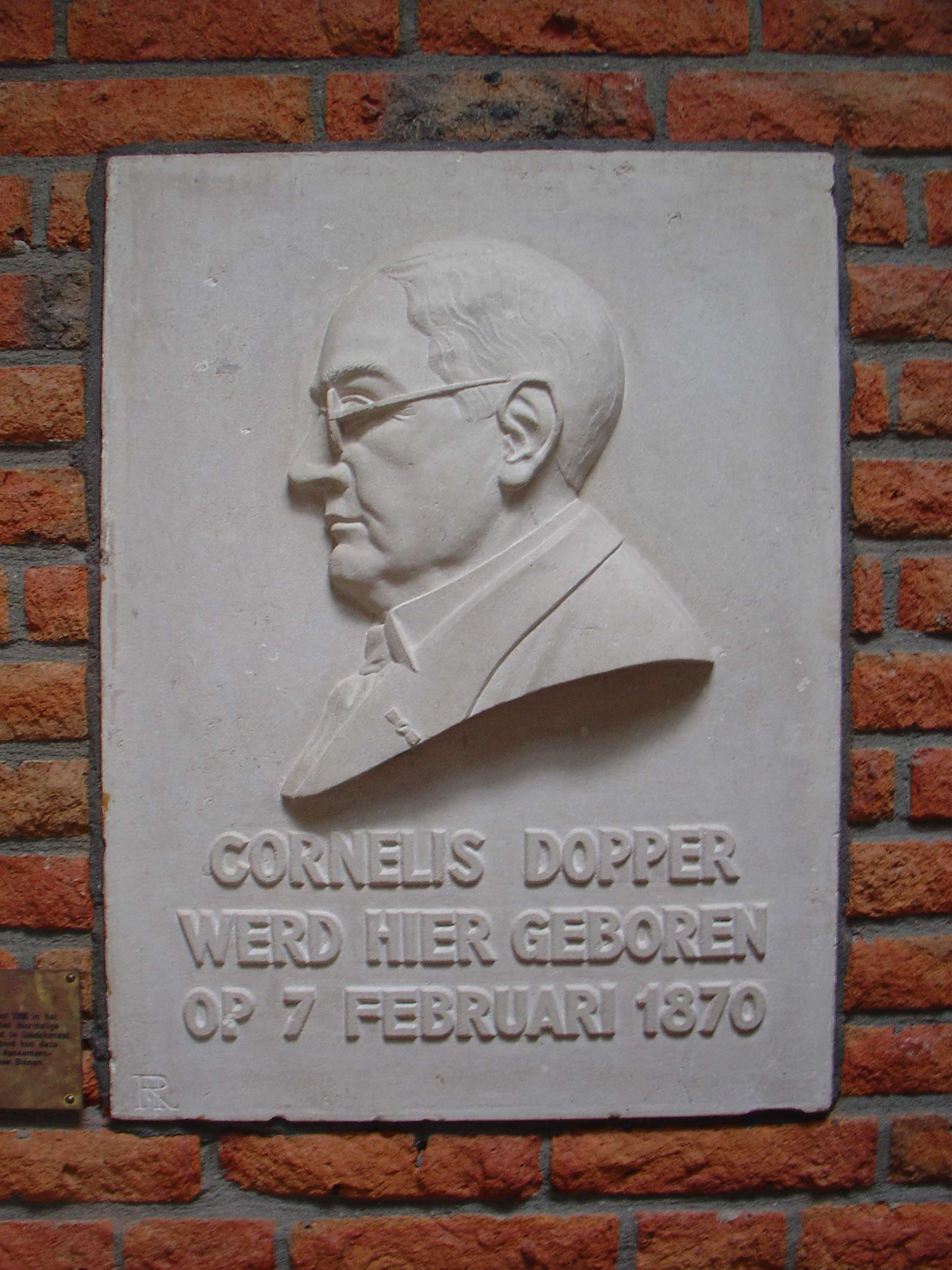 Cornelis Dopper door Hendrik Antonius ter Reegen - hal muzieschool (1996)